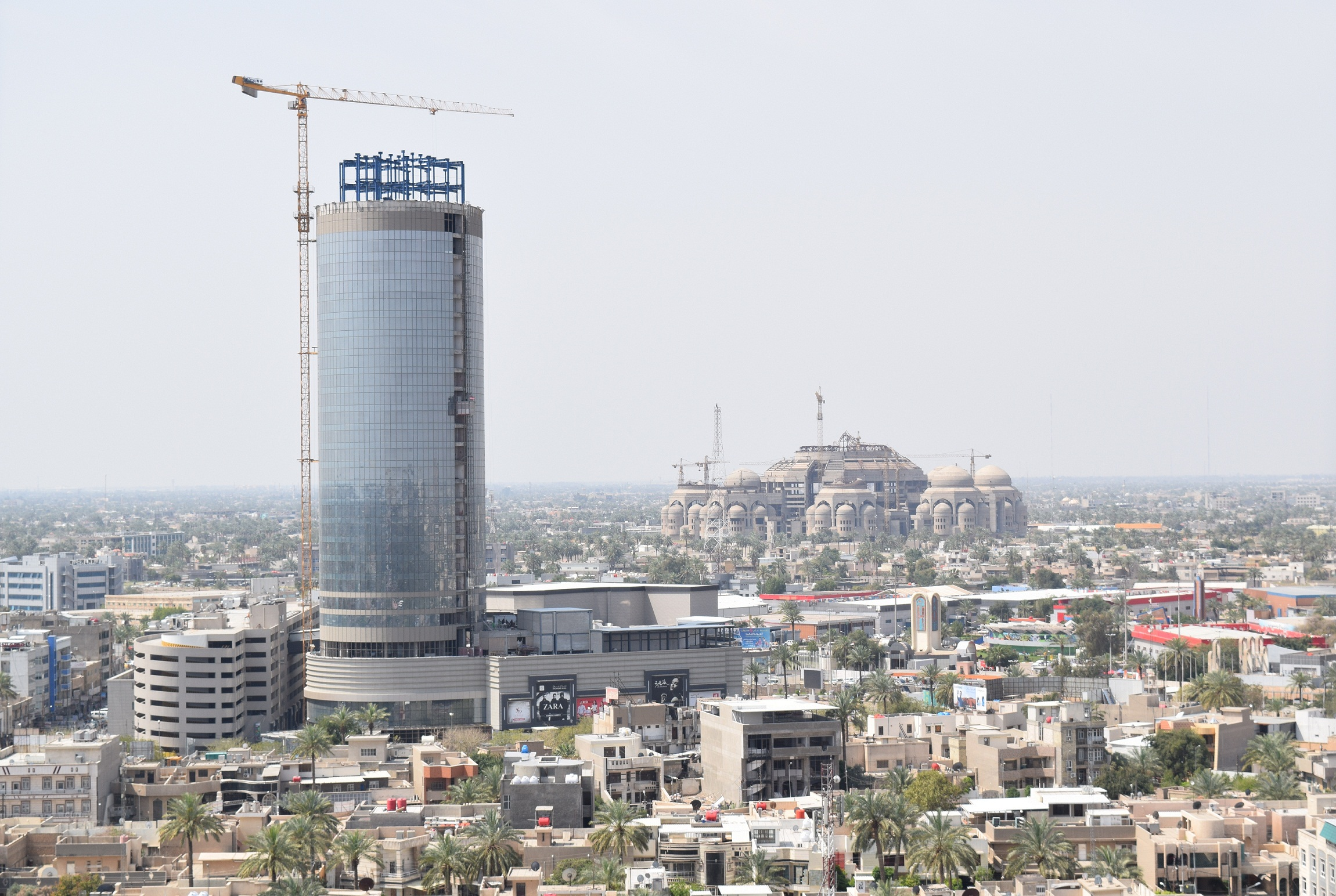 فندق بغداد روتانا ومول الحارثية، بغداد، الحارثية